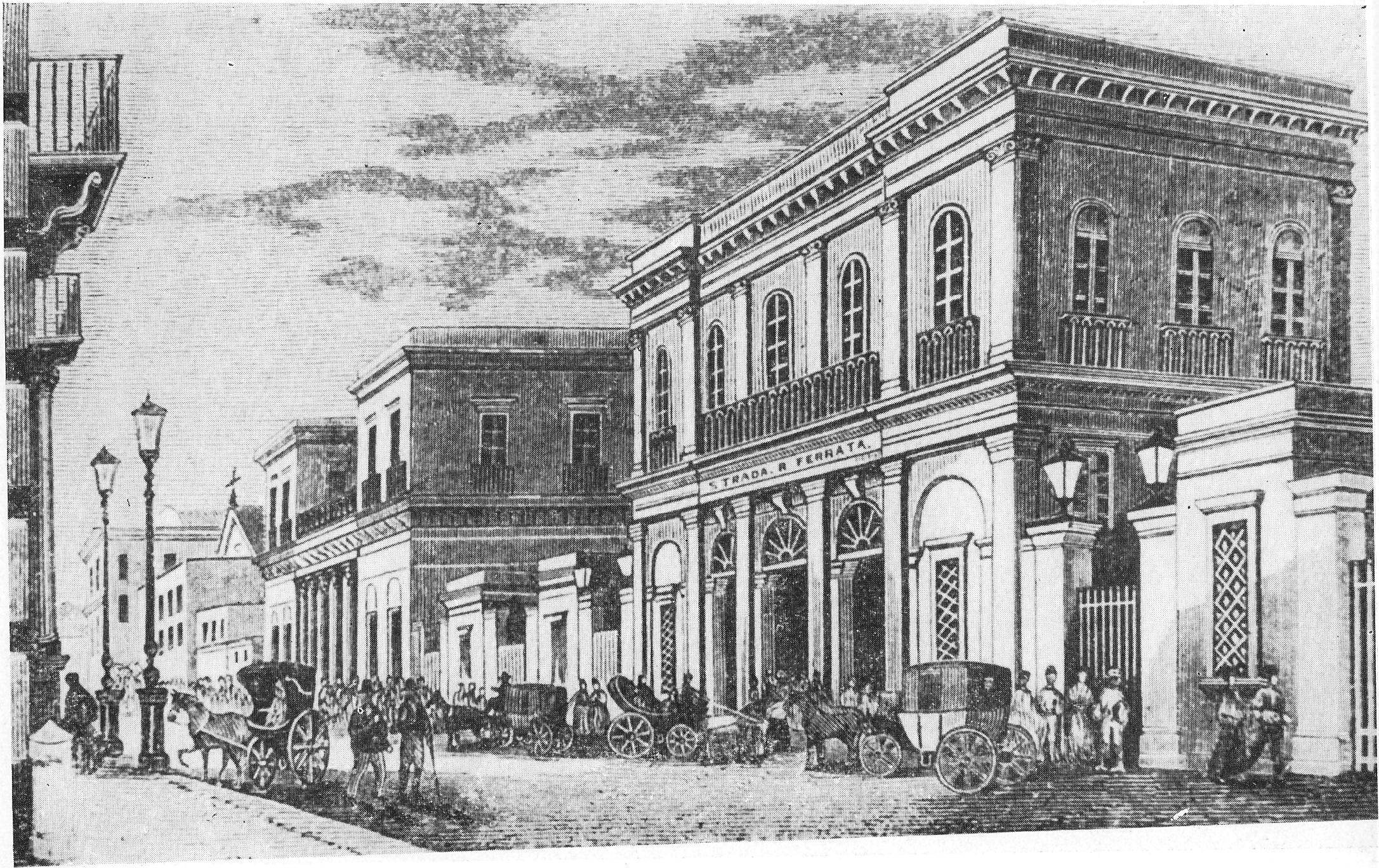 Le due stazioni di Napoli come apparivano in epoca borbonica (1860): a sinistra la "Regia" e a destra la "Bayard".